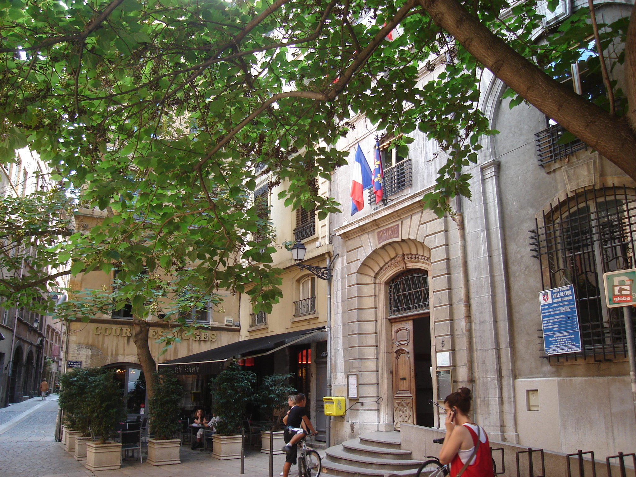 Annexe de la mairie du 5ème